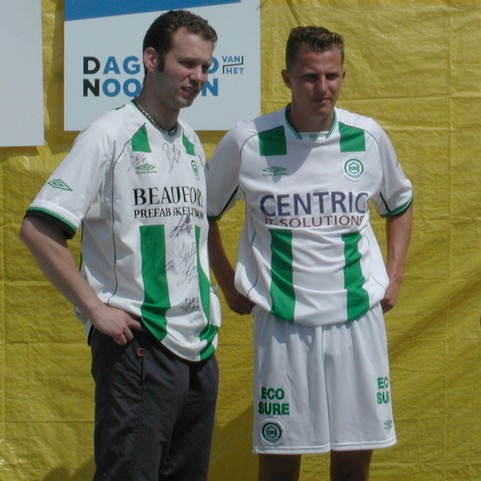 Jack Tuijp (rechts) namens FC Groningen in 2004.